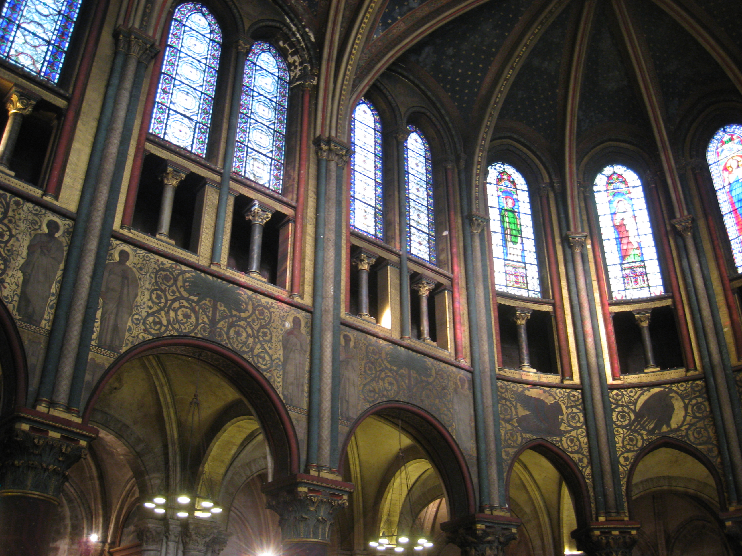 Abbaye de Saint-German-des-Prés, Paris, France - details of interior.